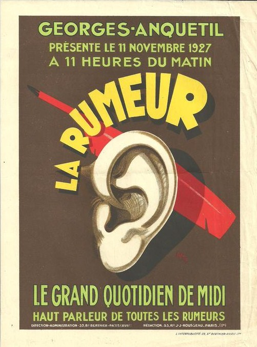 Affiche de lancement de La Rumeur par Georges-Anquetil en 1927 à Paris.